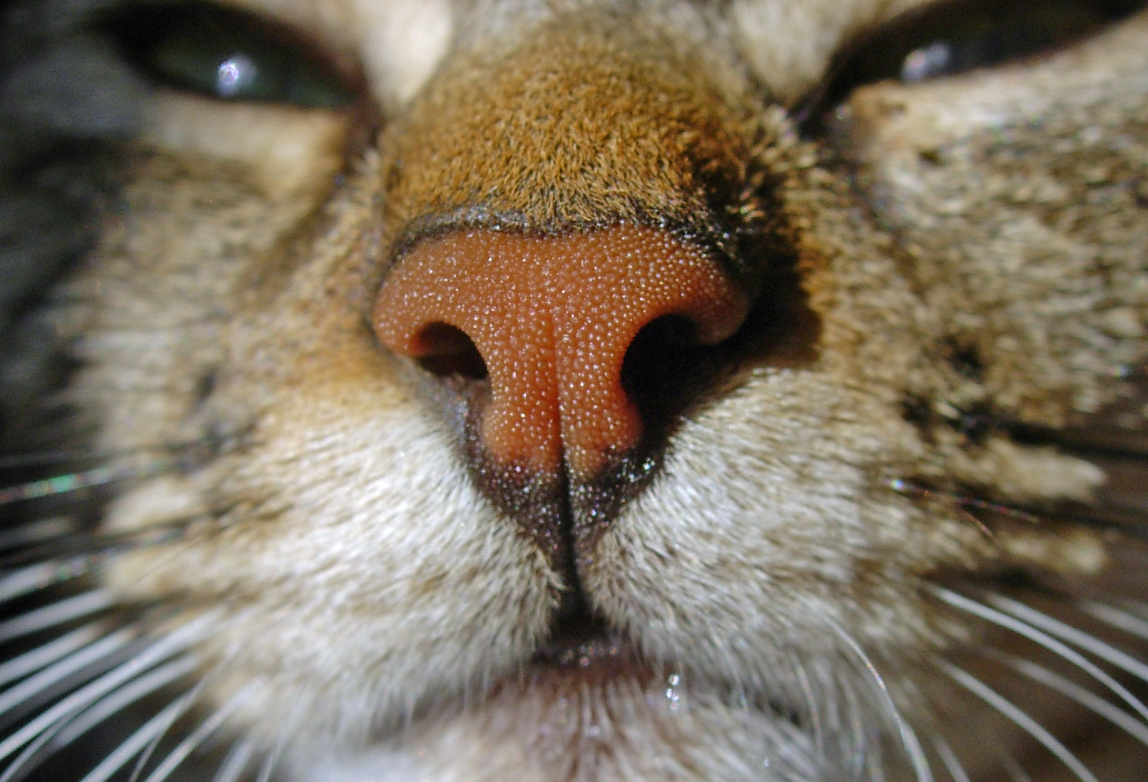 Nuesespigel bei der Kaz.